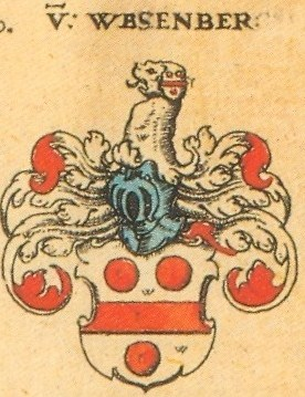 Johann Siebmacher: New Wappenbuch